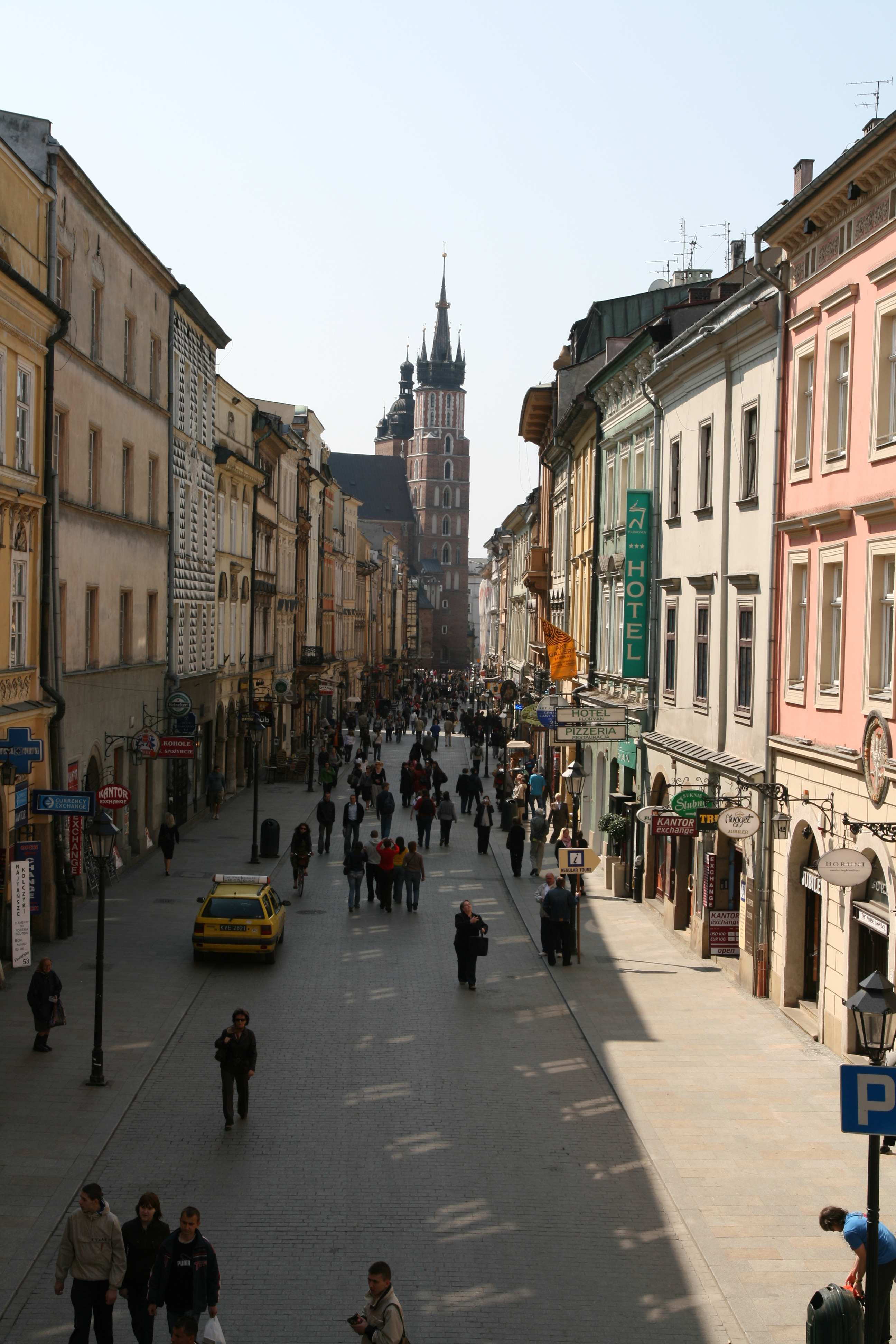 Ulica Floriańska w Krakowie